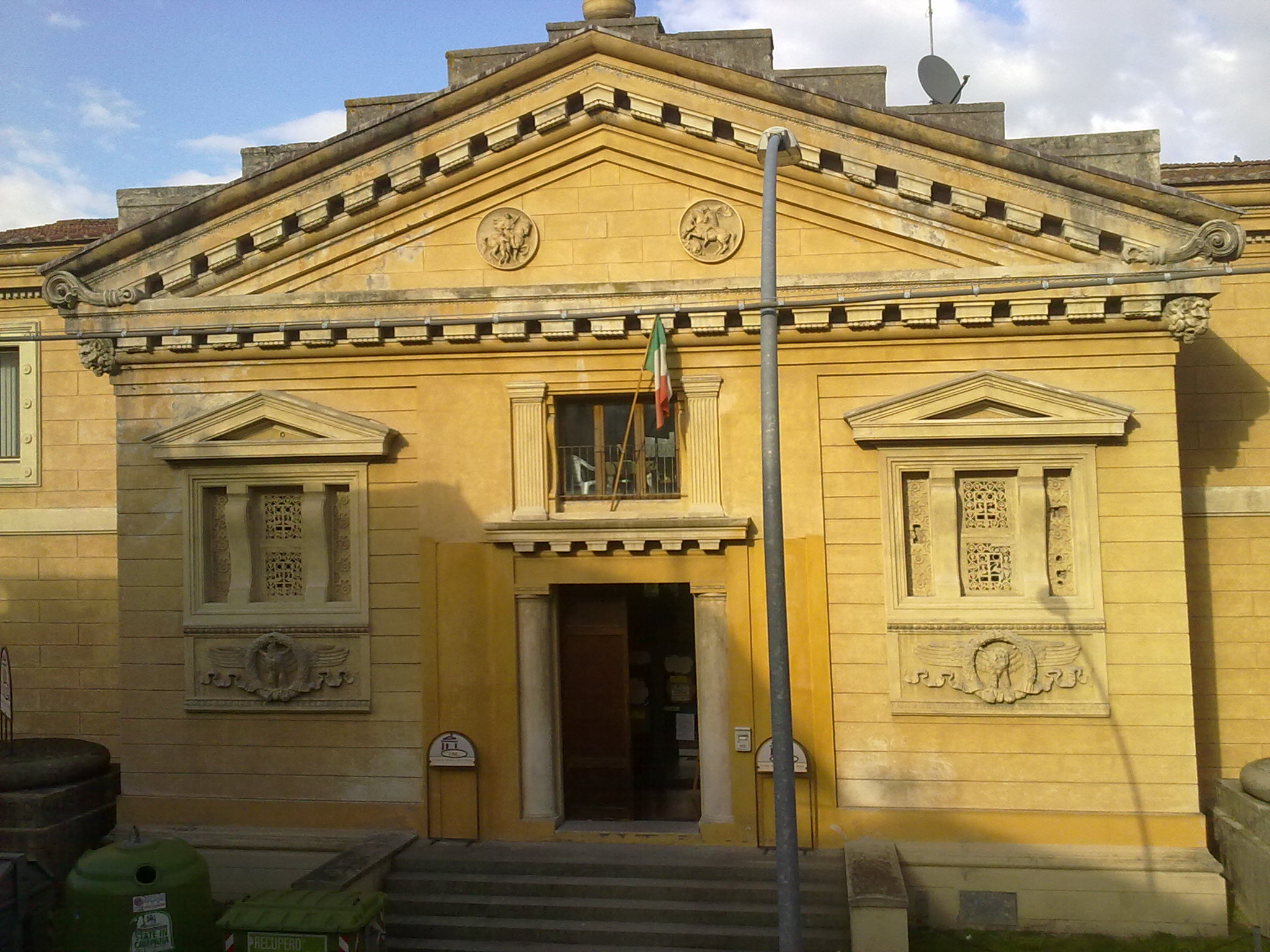 Ex Palazzo dei Sindacati di Lastra a Signa.